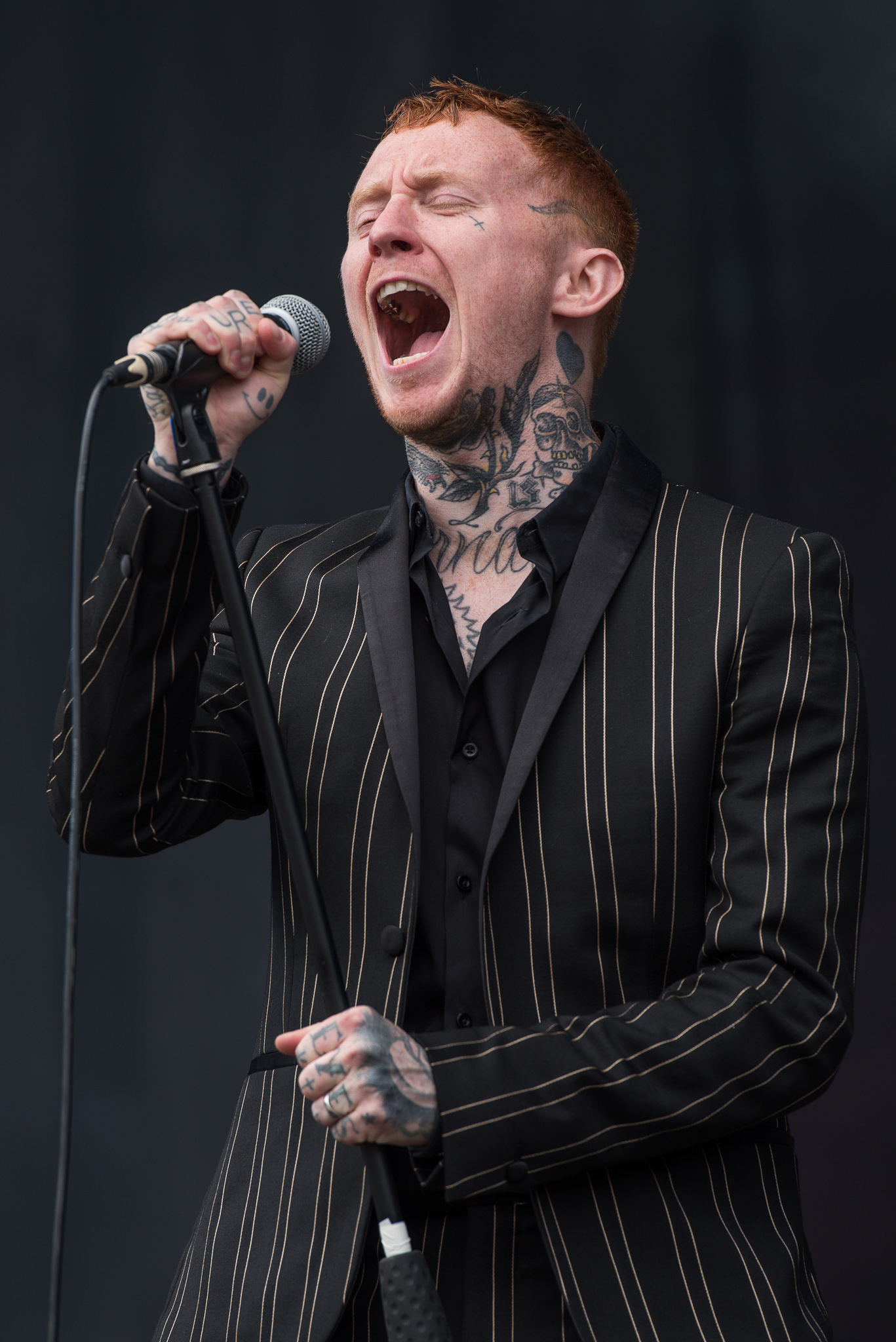 ARGO-Konzerte,Beck's Park Stage,Frank Carter,Frank Carter & The Rattlesnakes,Konzert,Livekonzert,Livemusik,Musik,RiP,Rock im Park 2017